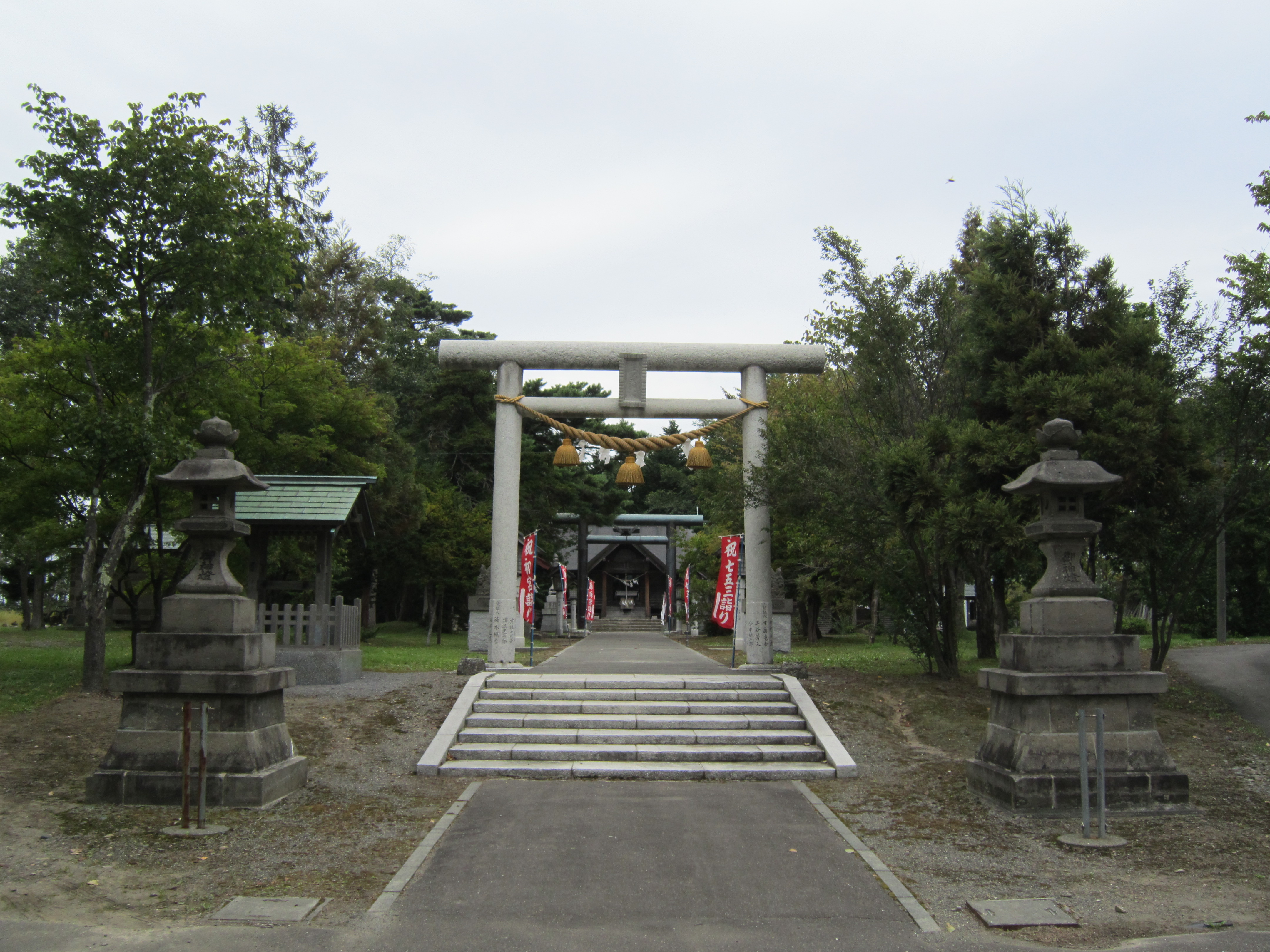 新十津川神社